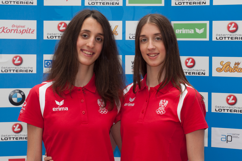 Einkleidung der Österreichischen Teilnehmer an den Olympischen Sommerspielen 2016 am 16./17. Juli 2016 in Wien. Bild zeigt Anna-Maria und Eirini-Marina Alexandri.